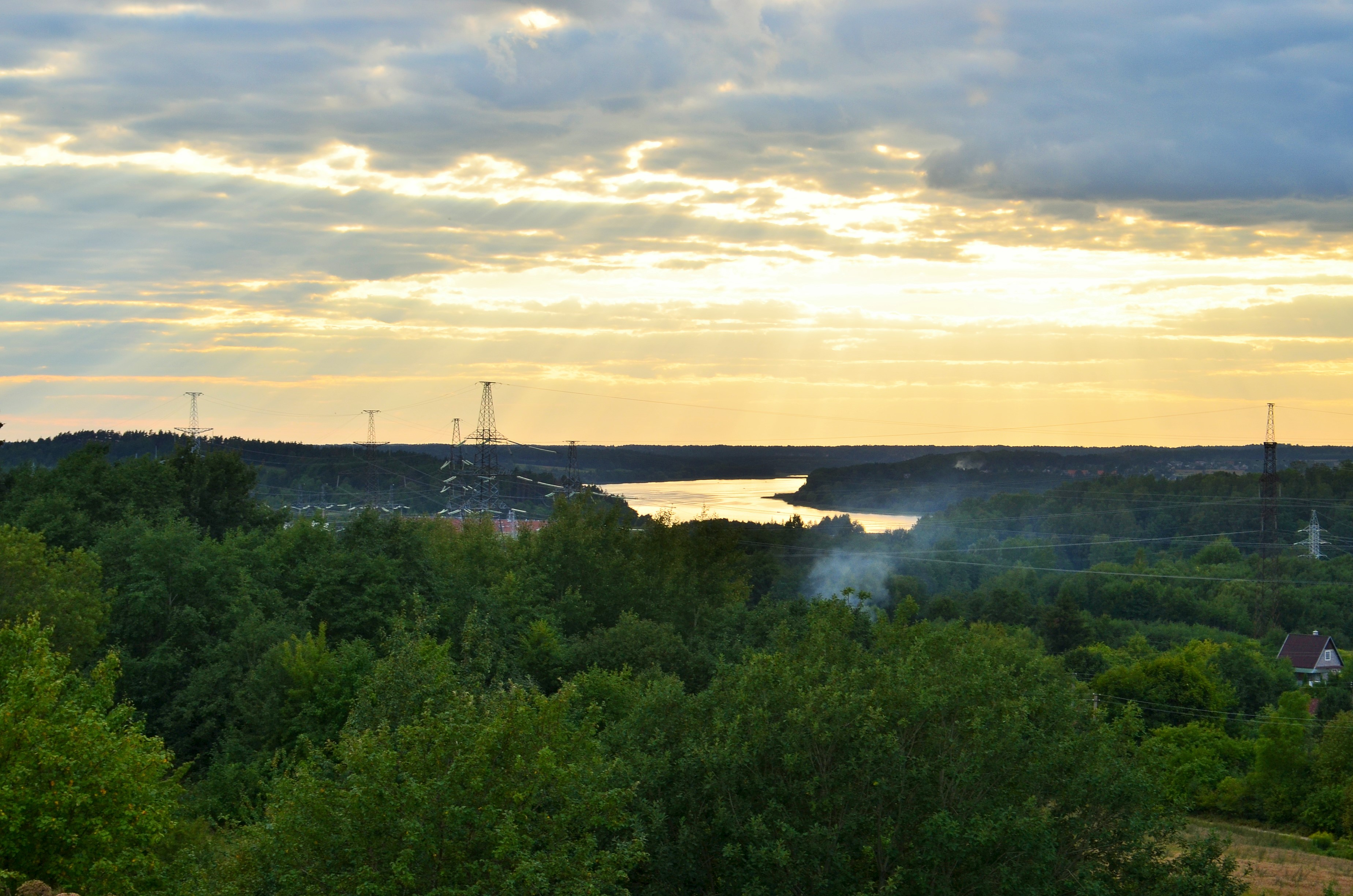 Nemunas žvelgiant nuo Maisiejūnų piliakalnio, Kaišiadorių raj.